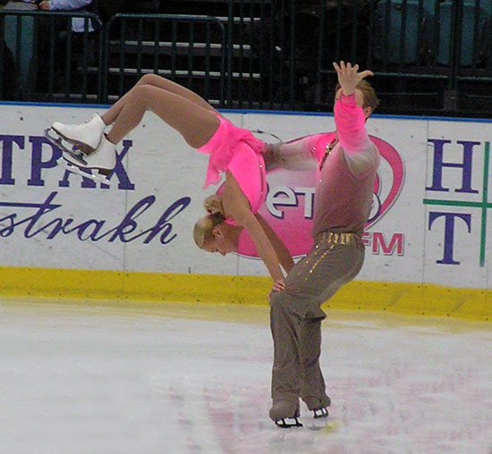 Obertas/Slawnow während der Russischen Meisterschaften 2005